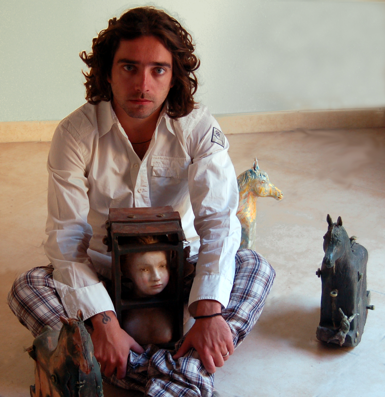 Giulio cavalli